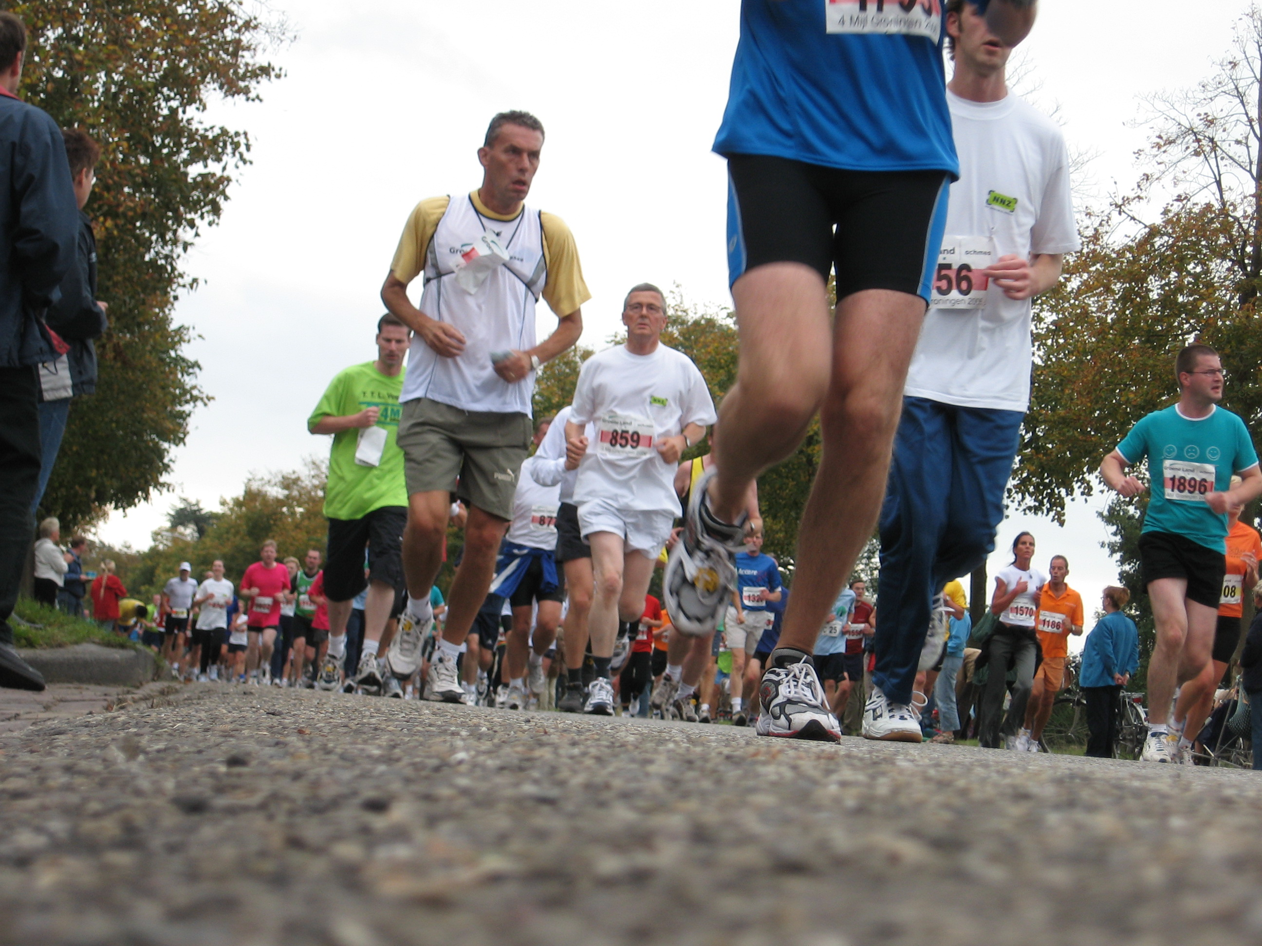 Foto van de 4 Mijl van Groningen 2006, genomen aan de Rijksstraatweg in Haren.